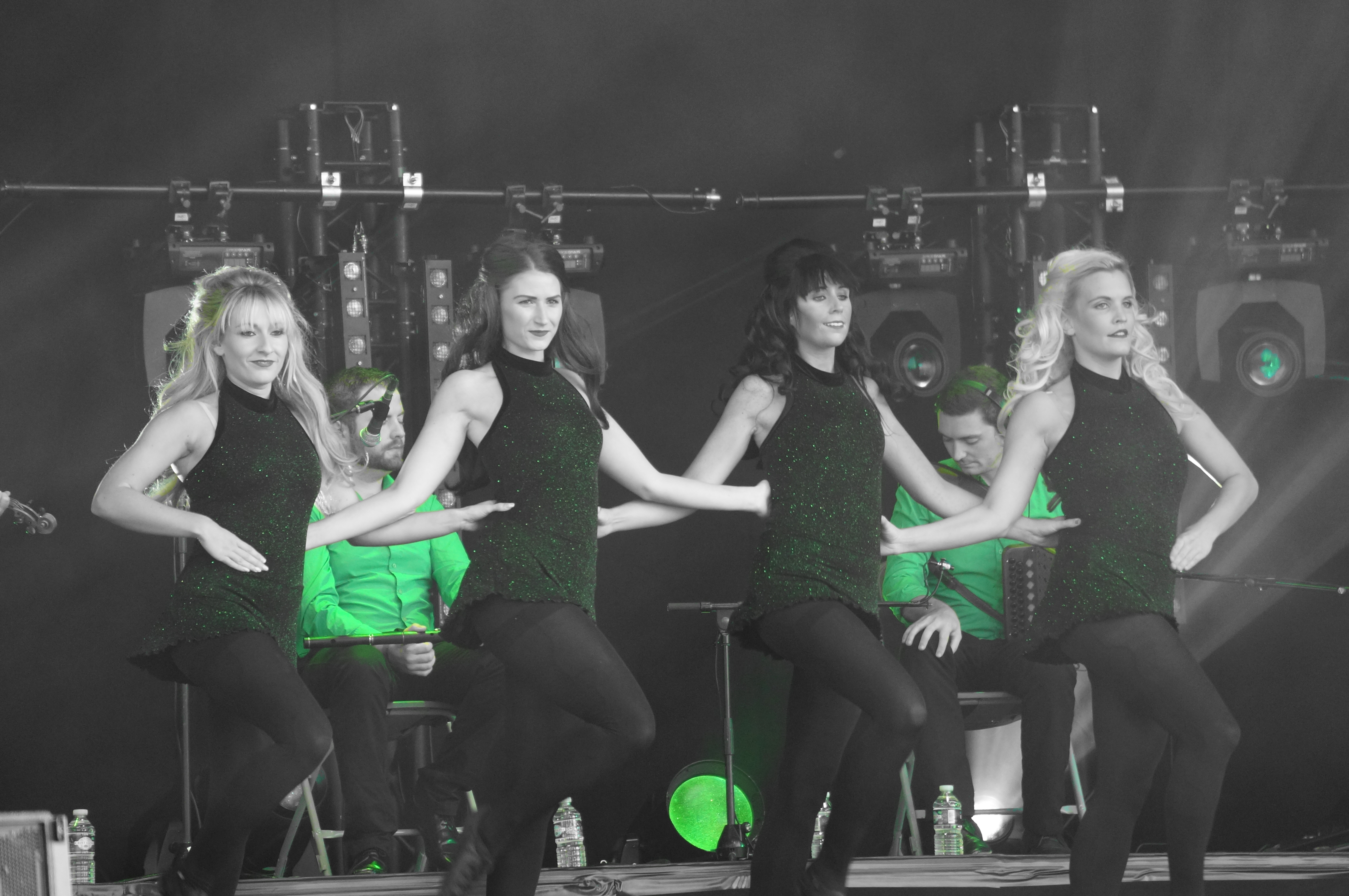 lors de la Foire de Châlons-en-Champagne 2014.